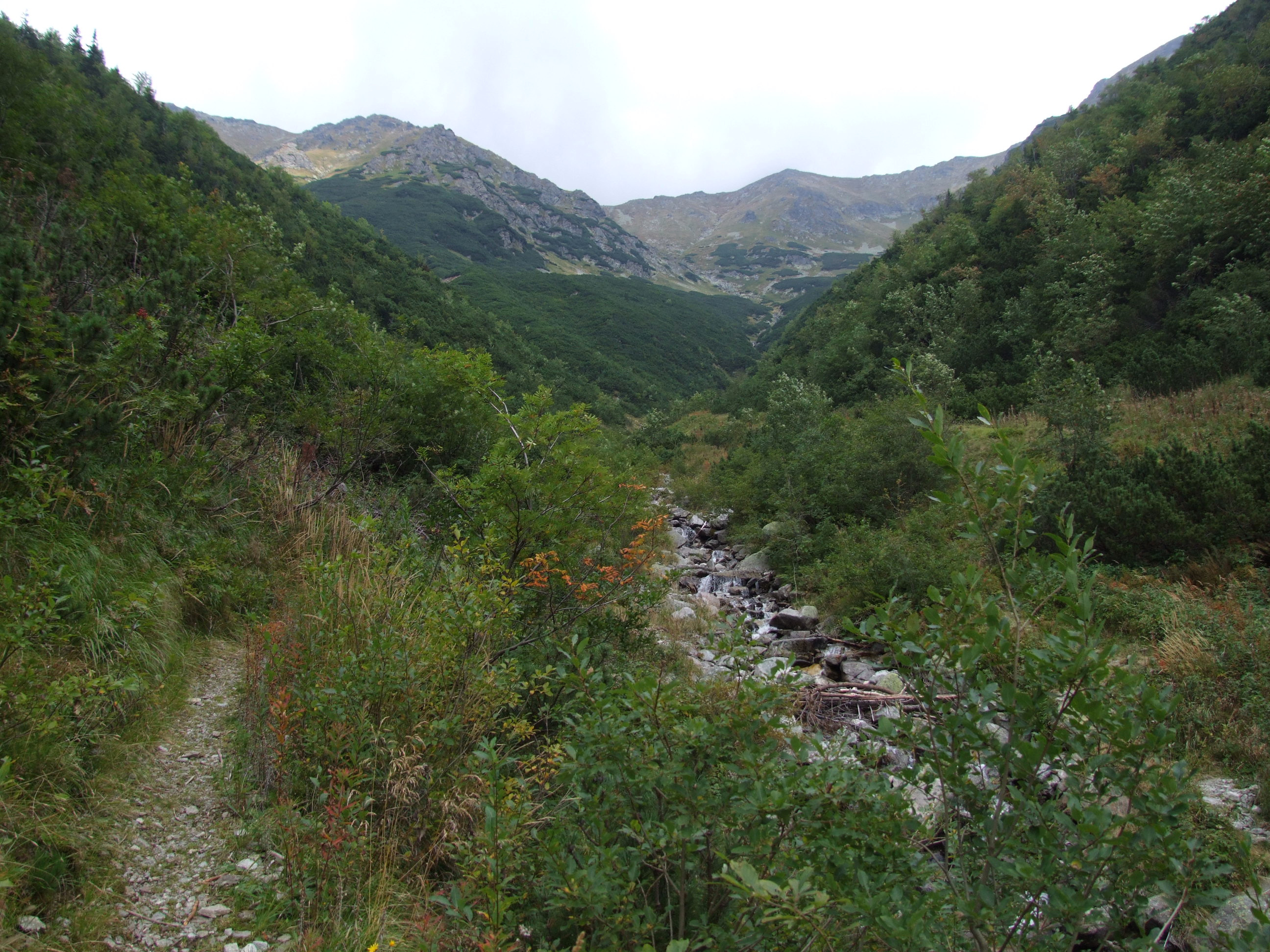 Dolina Parzychwost i potok Parzychwost. Po lewej stronie Zawraty